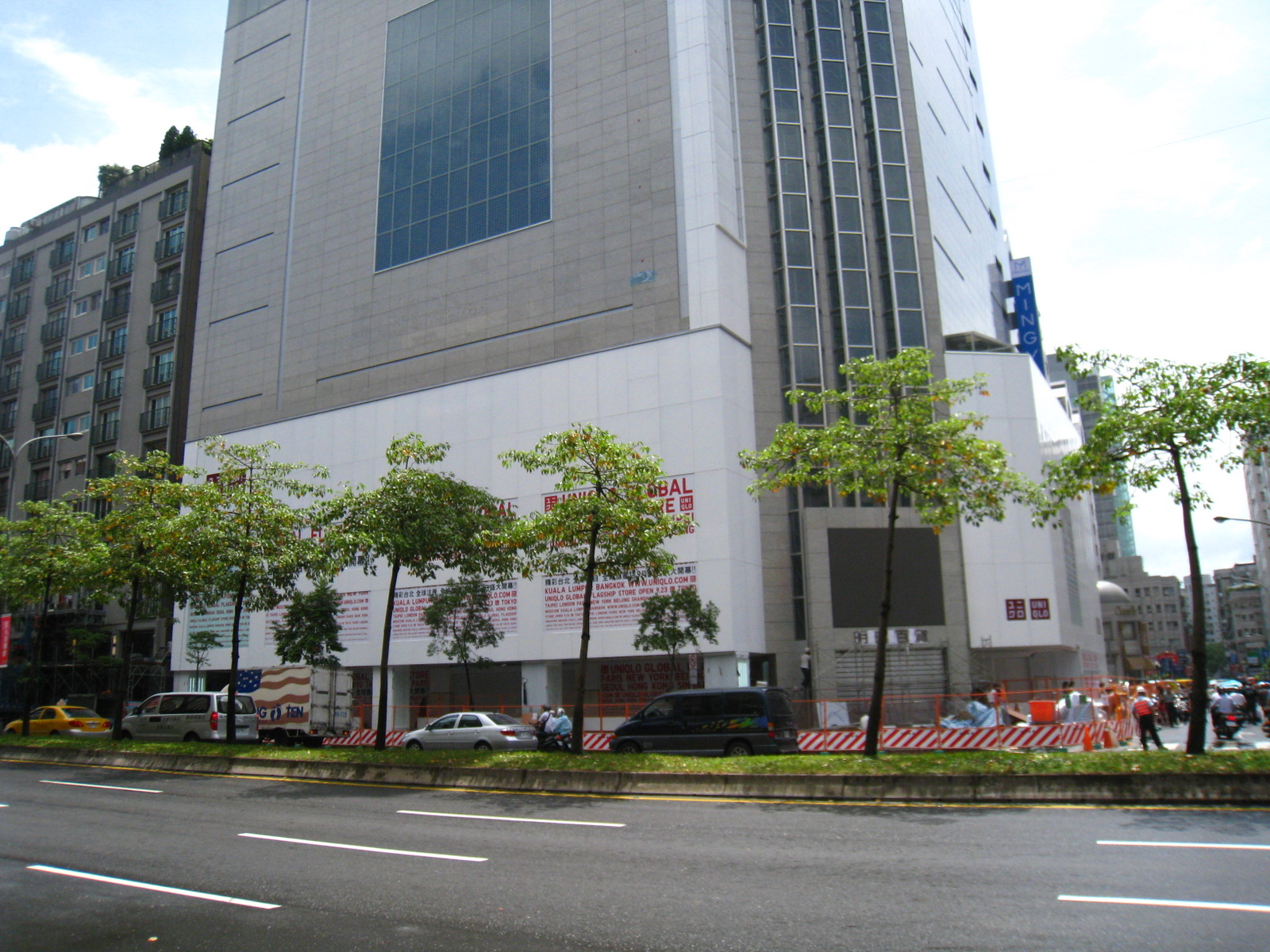 中文（台灣）: 明曜百貨2011年裝修後開幕前十天。